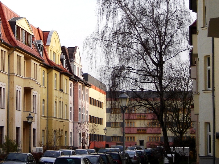 Zerbster Strasse, Magdeburg (Germany)